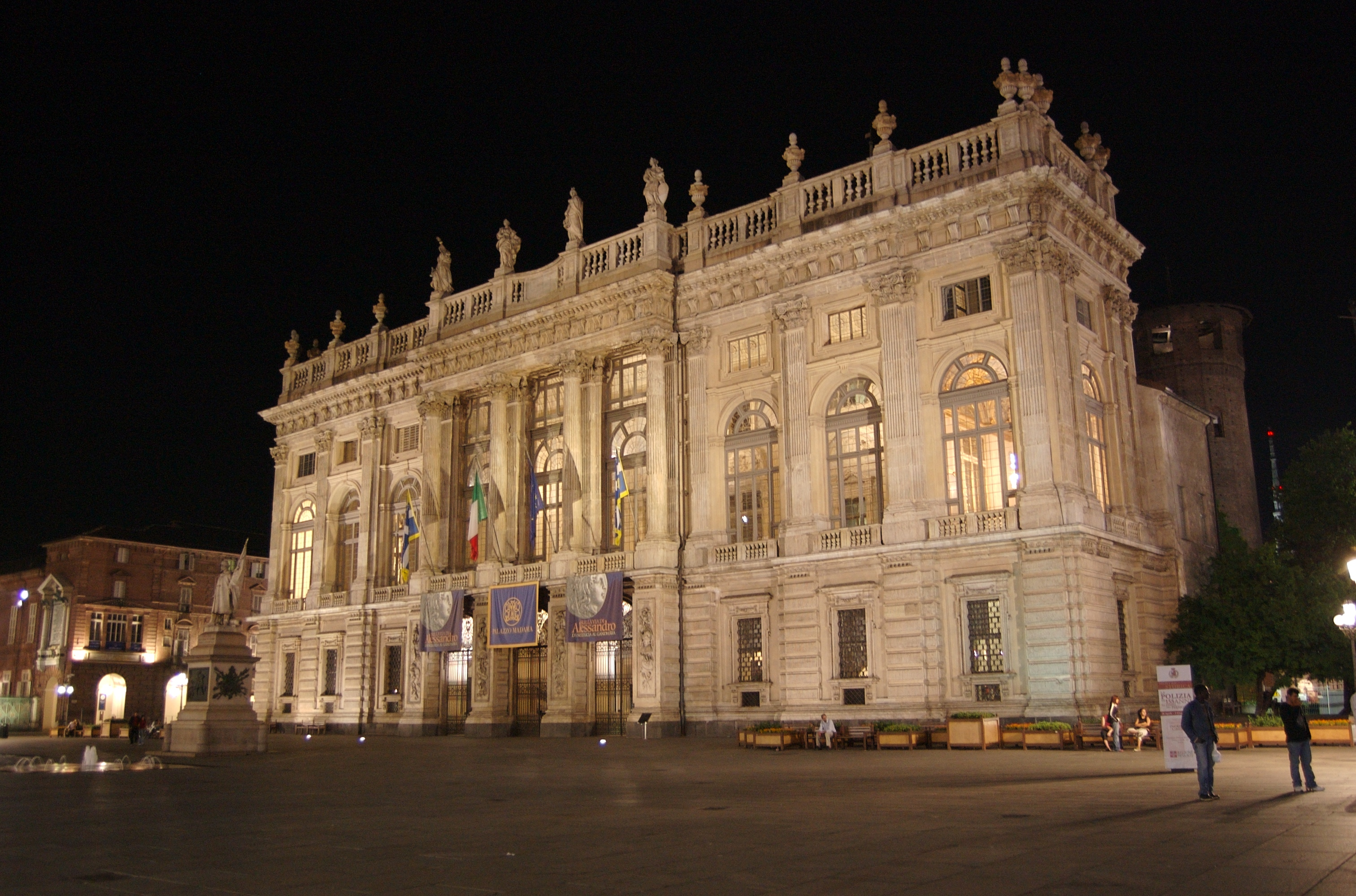 Palazzo Madama a Torino 1860s. Today.